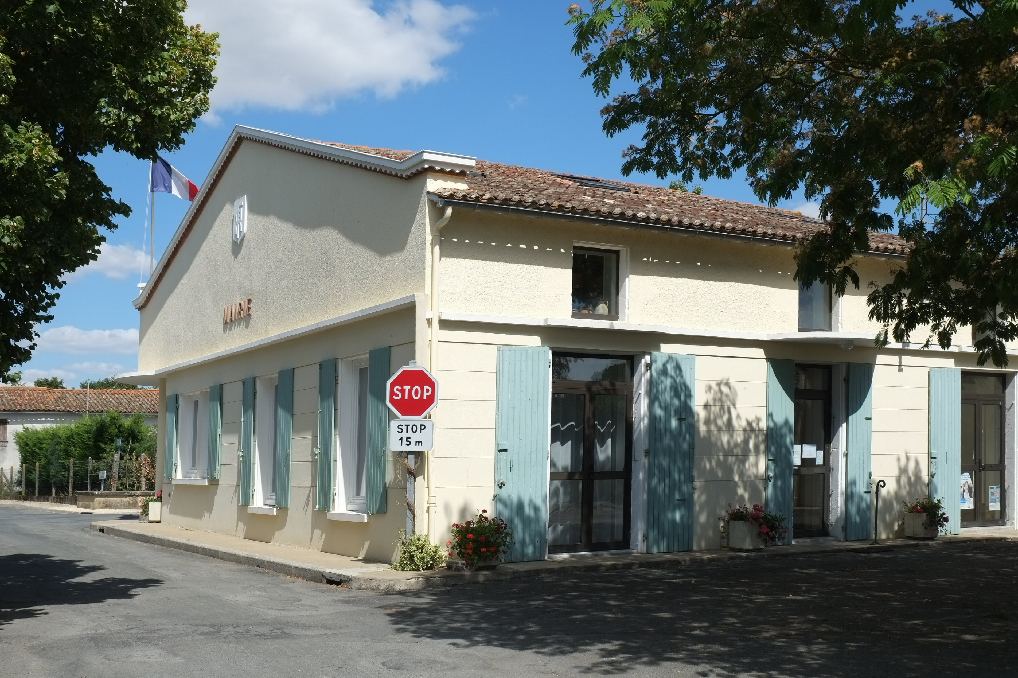 Mairie Saint-Pierre-d'Amilly Charente-Maritime France